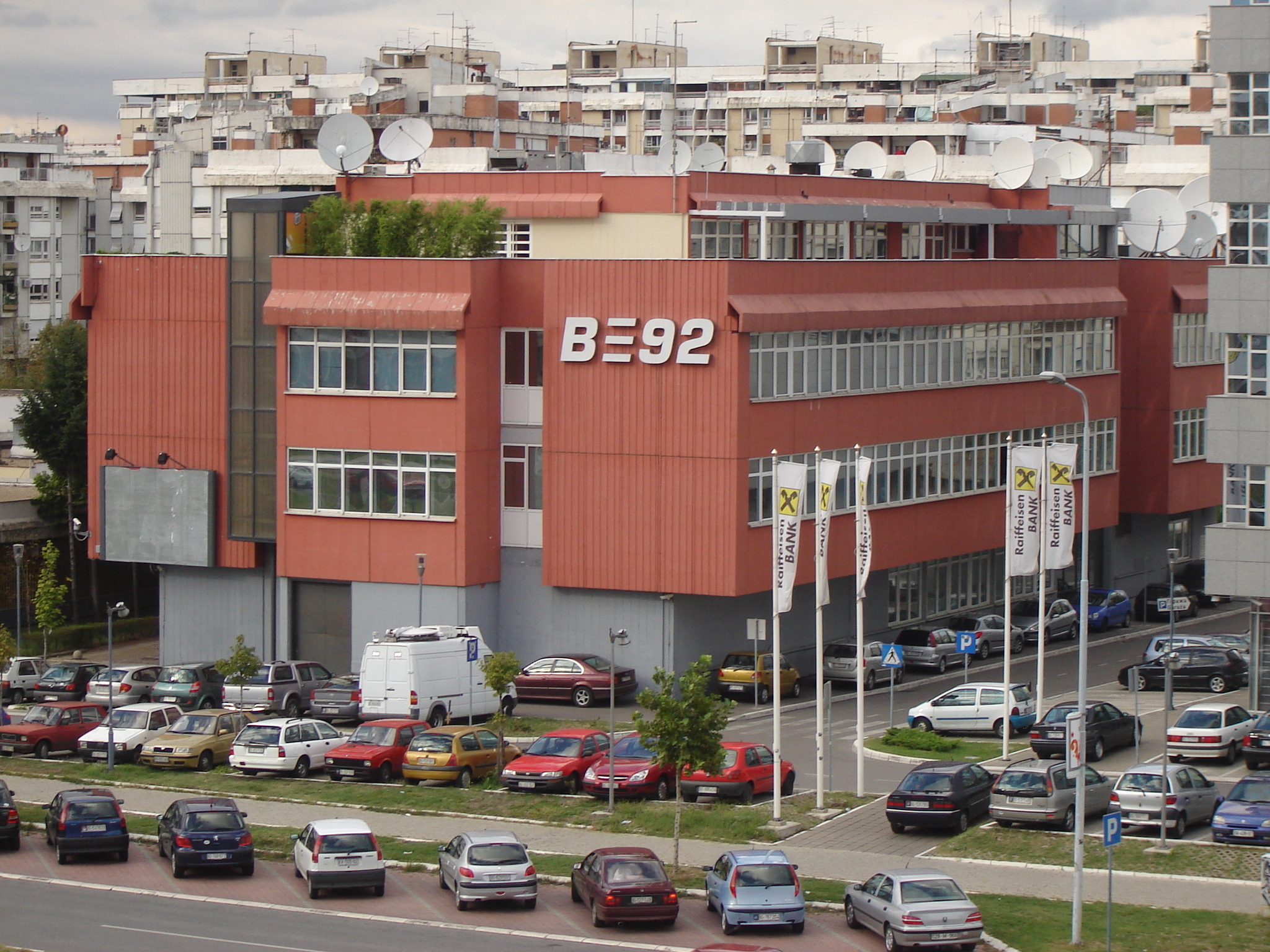 Сједиште Б92 на Новом Београду.